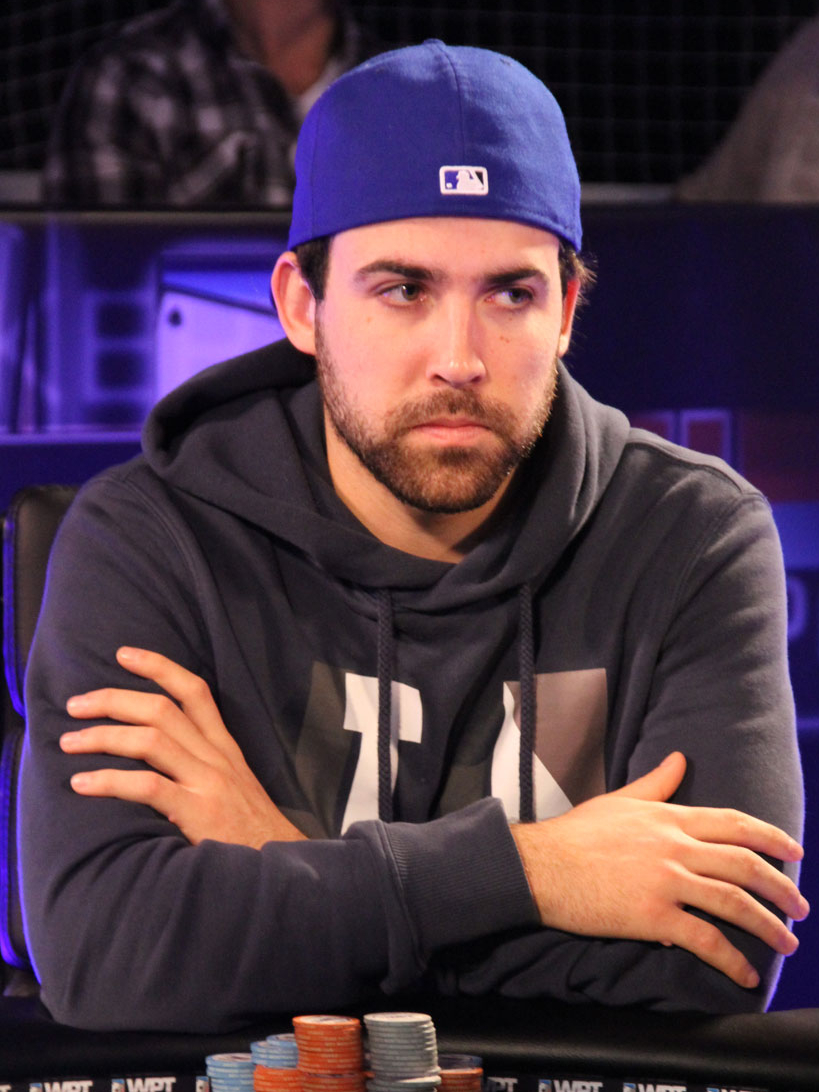 Pascal Lefrançois bei der WPT Montreal im November 2012